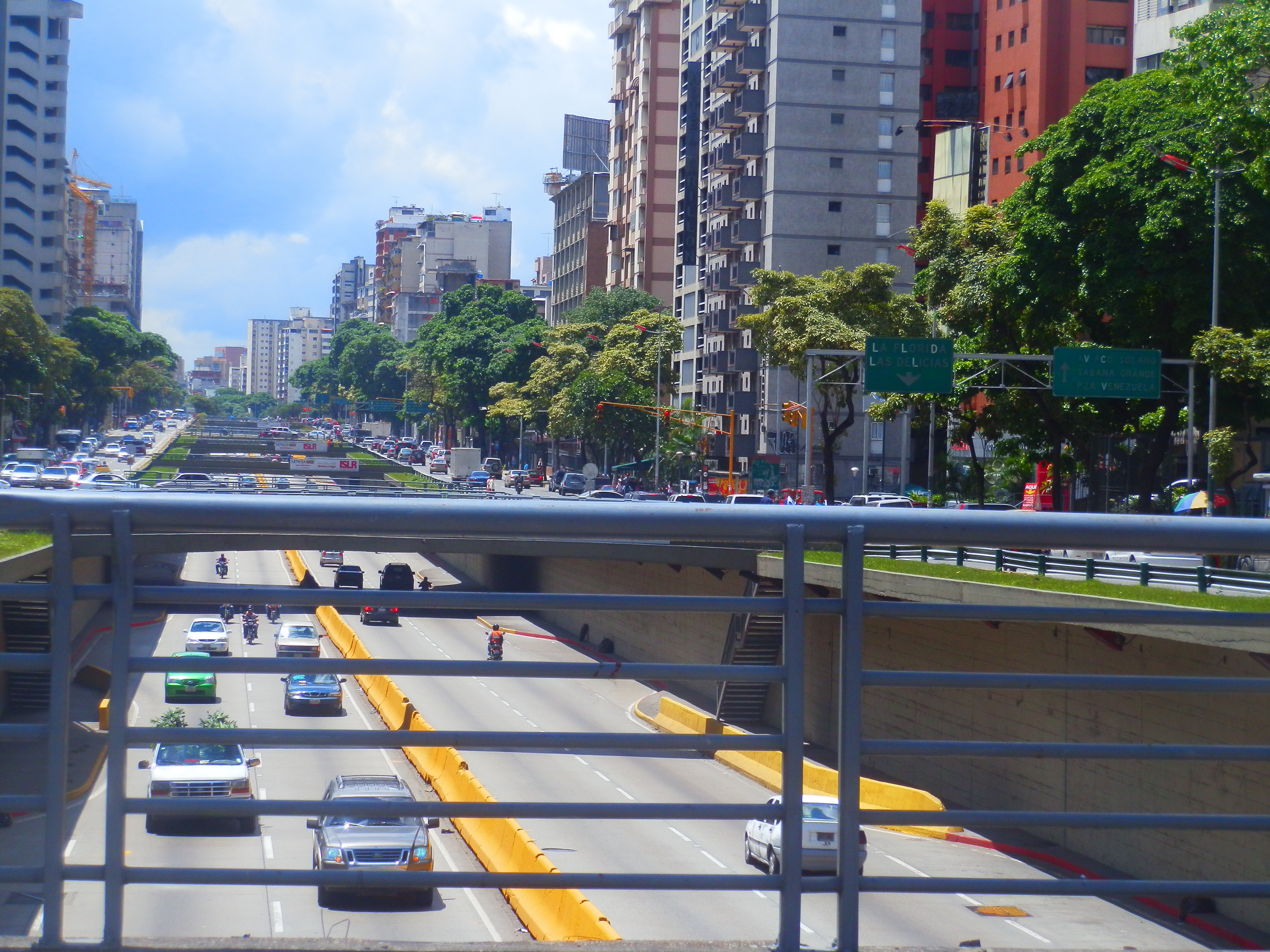 Avenida Libertador, Caracas, Venezuela